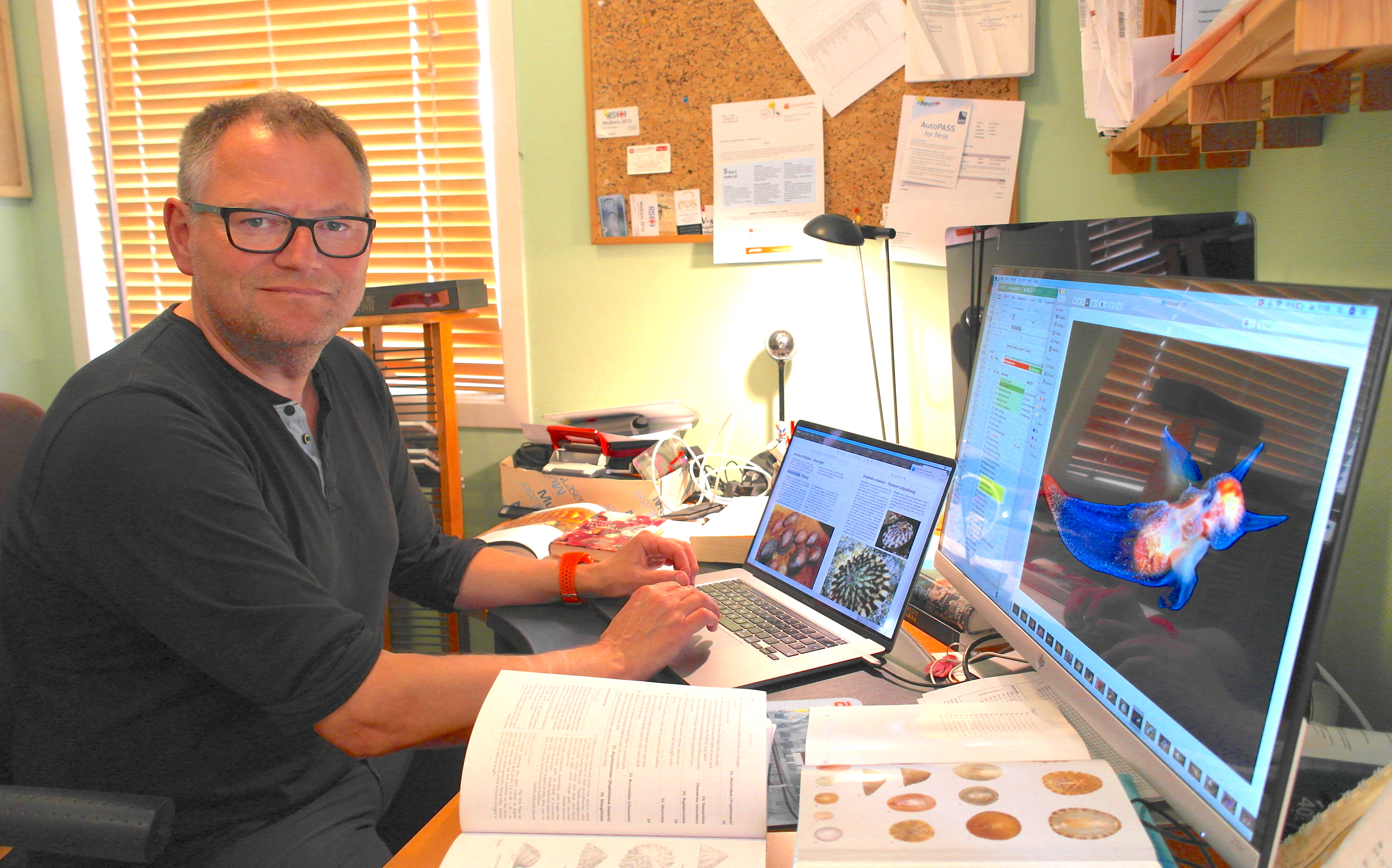 Foto av fagbokforfatter Frank Emil Moen